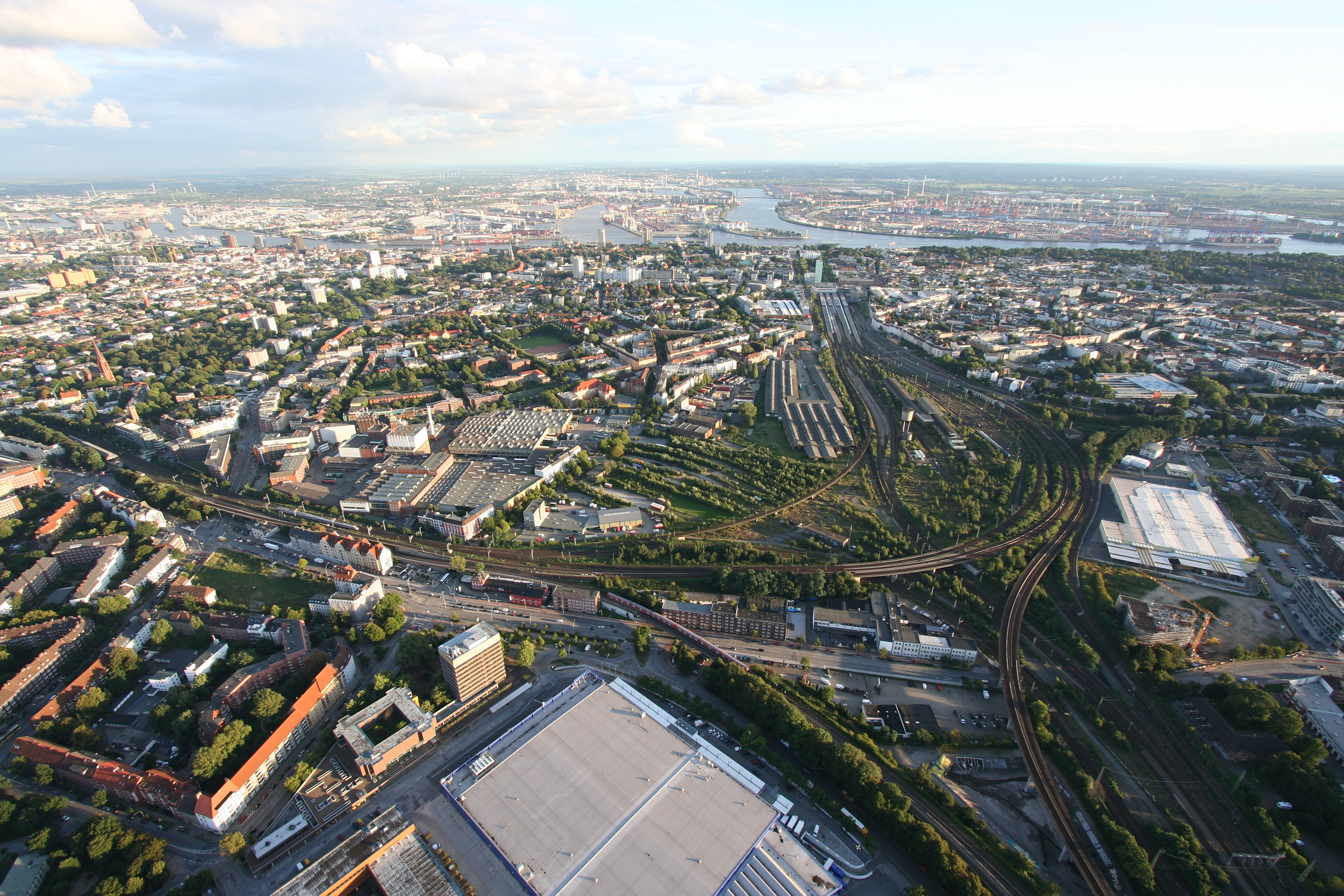 Diebsteichkurve, Bahnhof Altona, Holsten-Brauerei